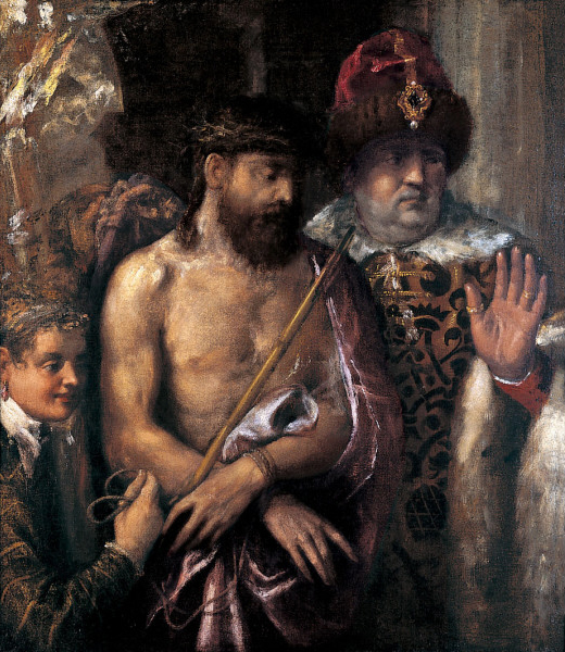 unsigned